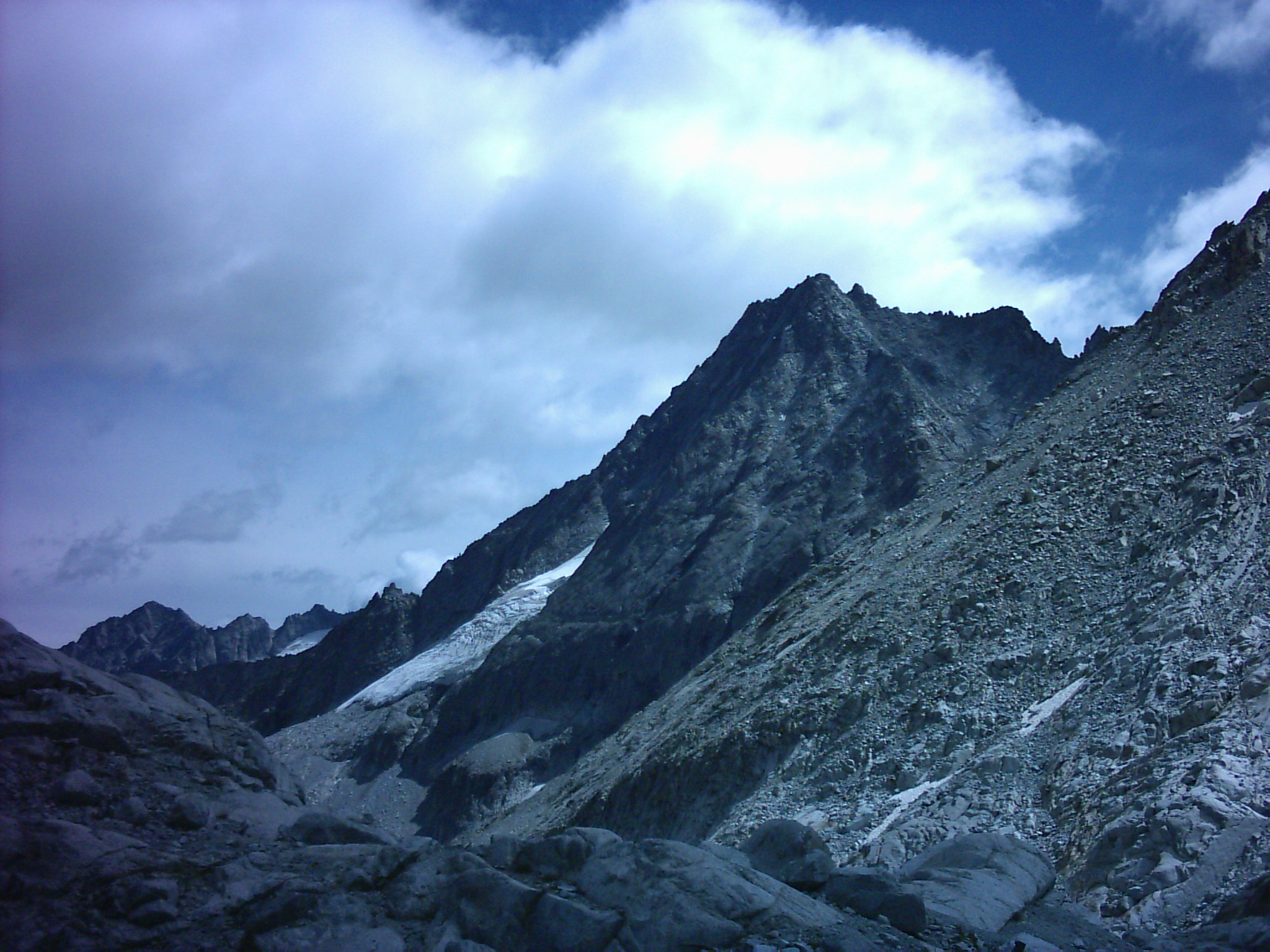 Presanella mountains: Cima Busazza (3326 m) taken from Presena Glacier.